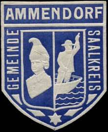 Sealing stamp Title: Gemeinde Ammendorf Saalkreis Description: blau, weiß, geprägt Place: Ammendorf size: 4x3 cm